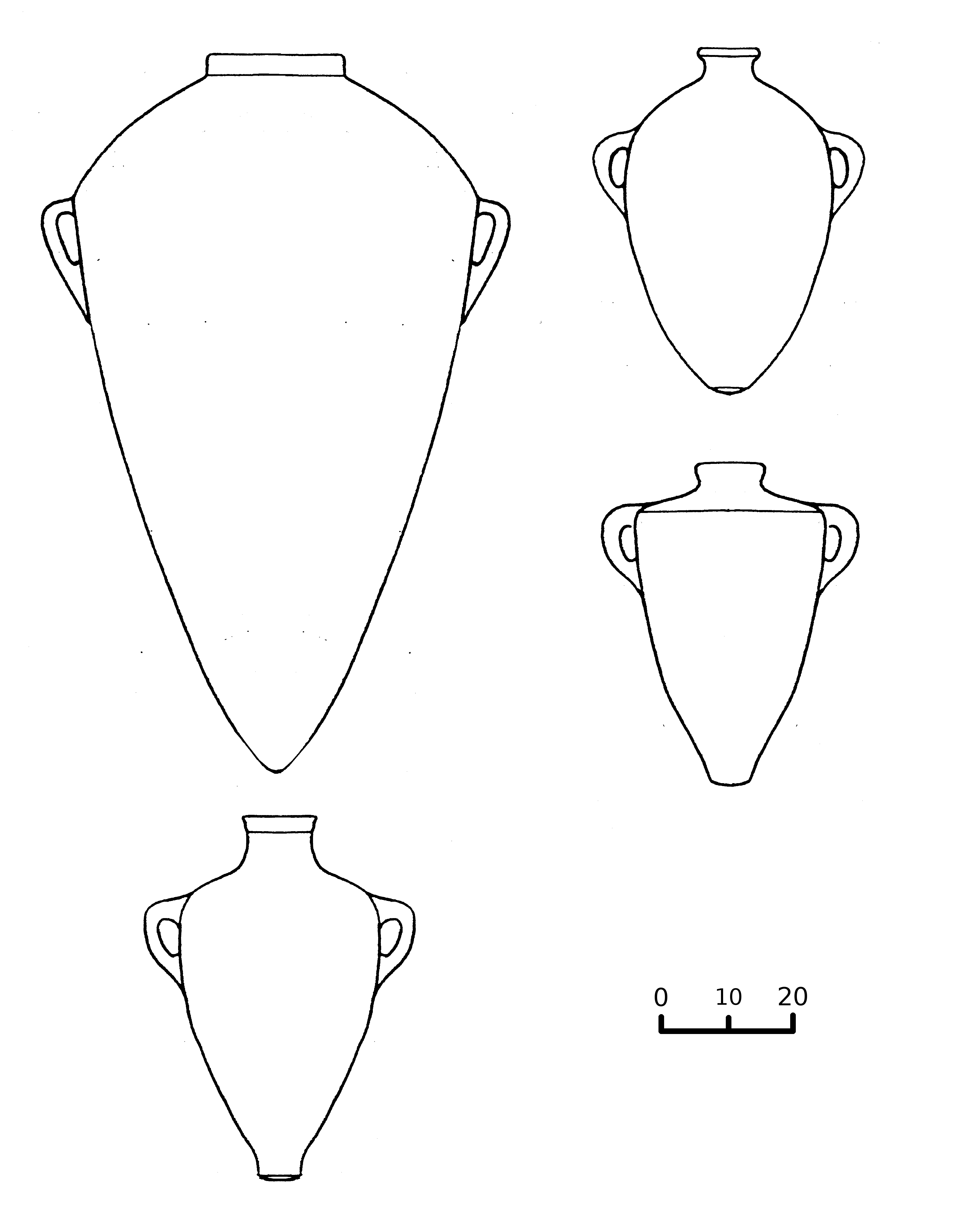 Schematische Umzeichnungen eisenzeitlicher Amphorentypen aus dem Phönizischen Raum. Zeichnung basiert auf Abb. 2 aus D. Regev: The Phoeniian Transport Amphora. In: J. Eiring und J. Lund: Transport Amphorae and Trade in the Eastern Mediterranean, 2004, 337-352.